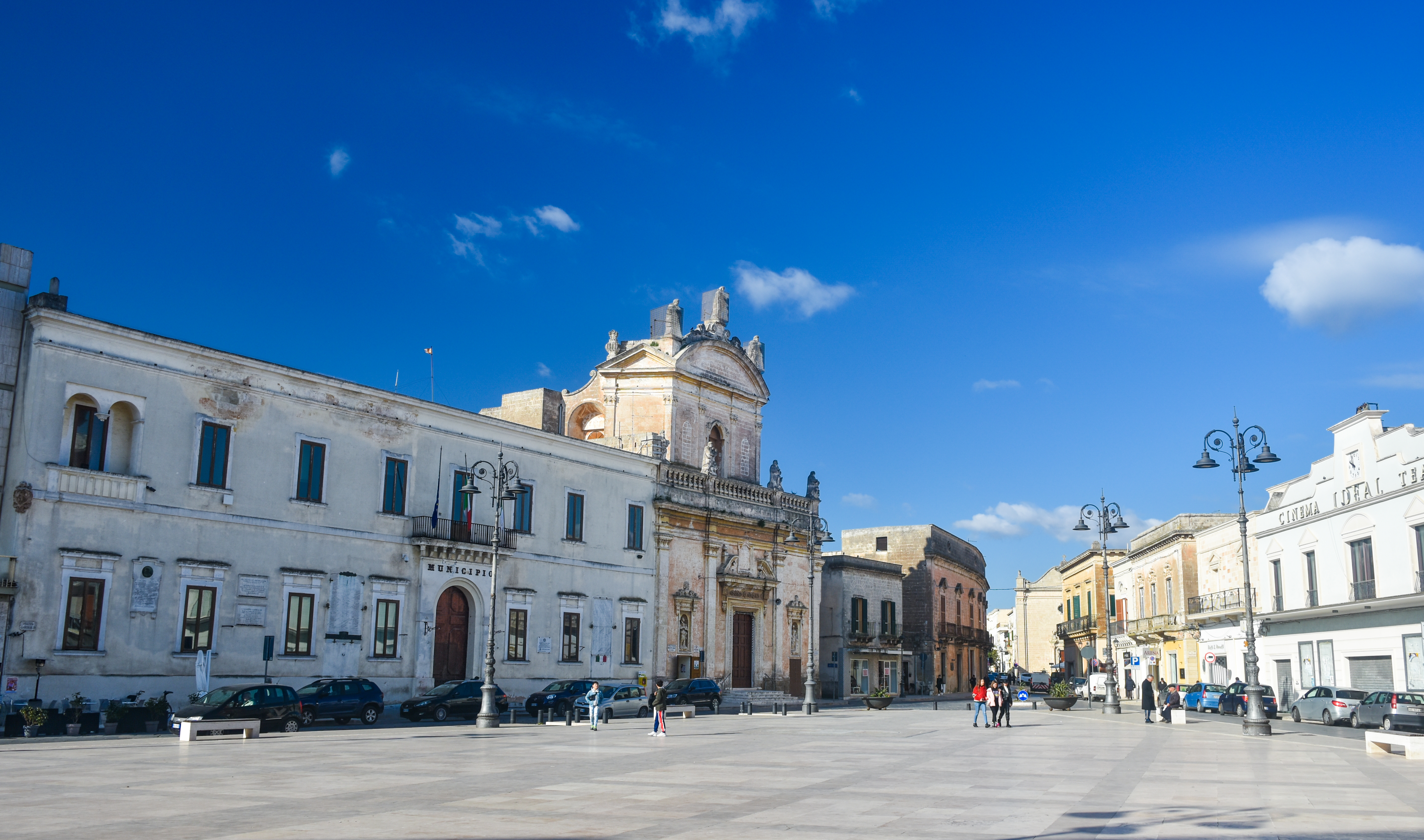 La Piazza Garibaldi, la piazza centrale del paese di Manduria, come appare nel febbraio 2020